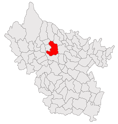 Categorie:Hărţi ale judeţului Buzău